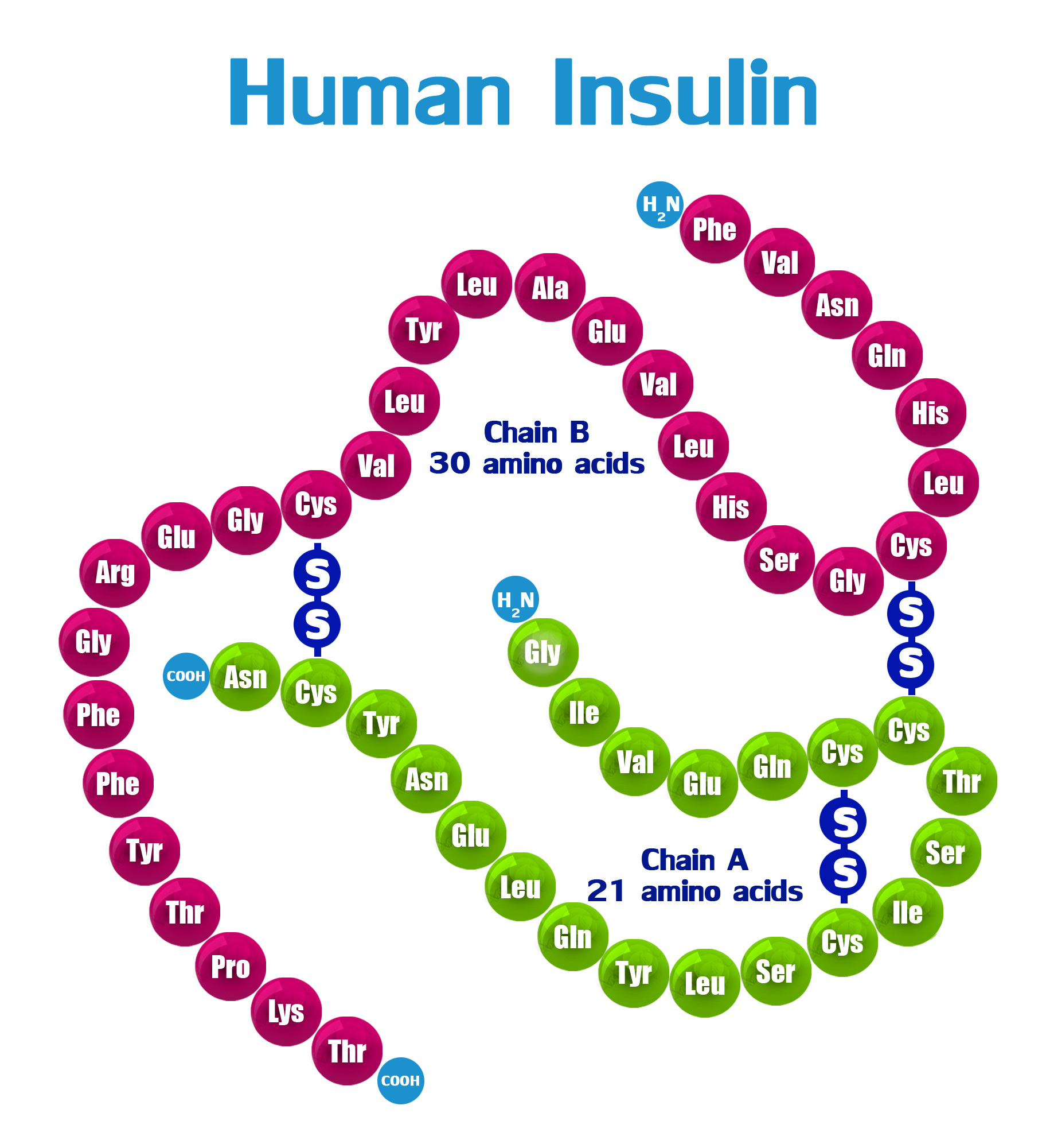 Молекула гормона инсулина образована двумя полипептидными цепями, А и В, которые соединены дисульфидными мостиками (S—S). Первичная структура инсулина у разных видов различается, к человеческому наиболее близок инсулин свиньи, который отличается всего одним аминокислотным остатком.